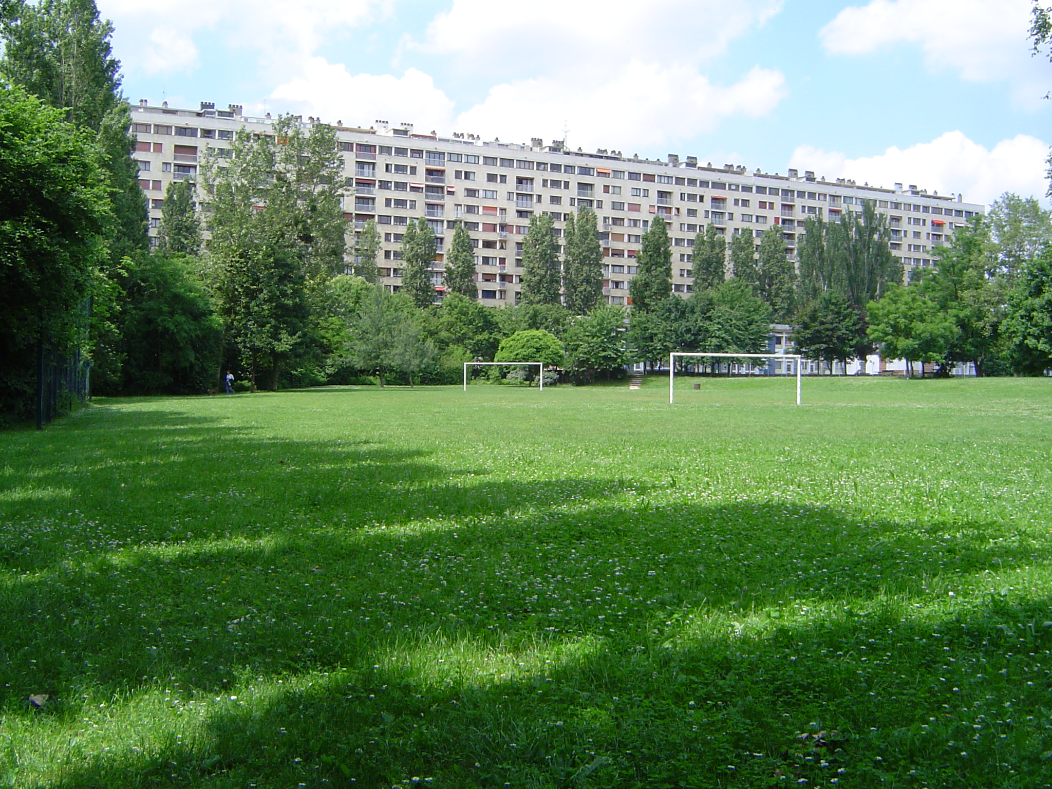 Parc La Fontaine à Antony